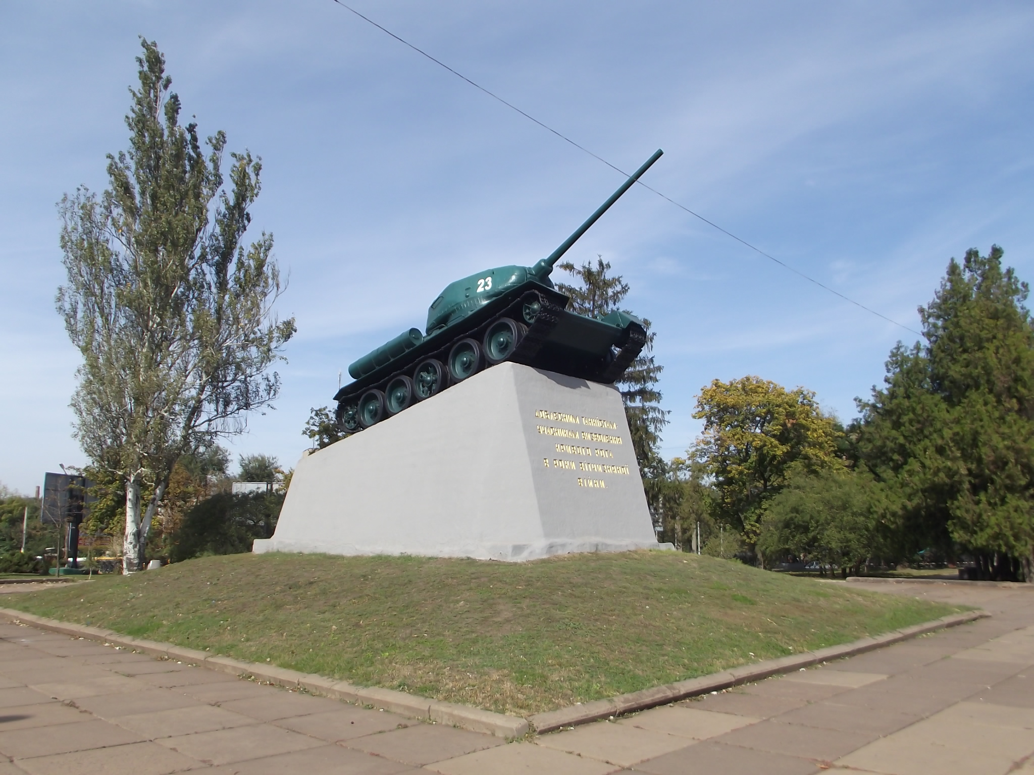 Меморіал «Танкістам – визволителям», Кривий Ріг, площа Визволення, сквер